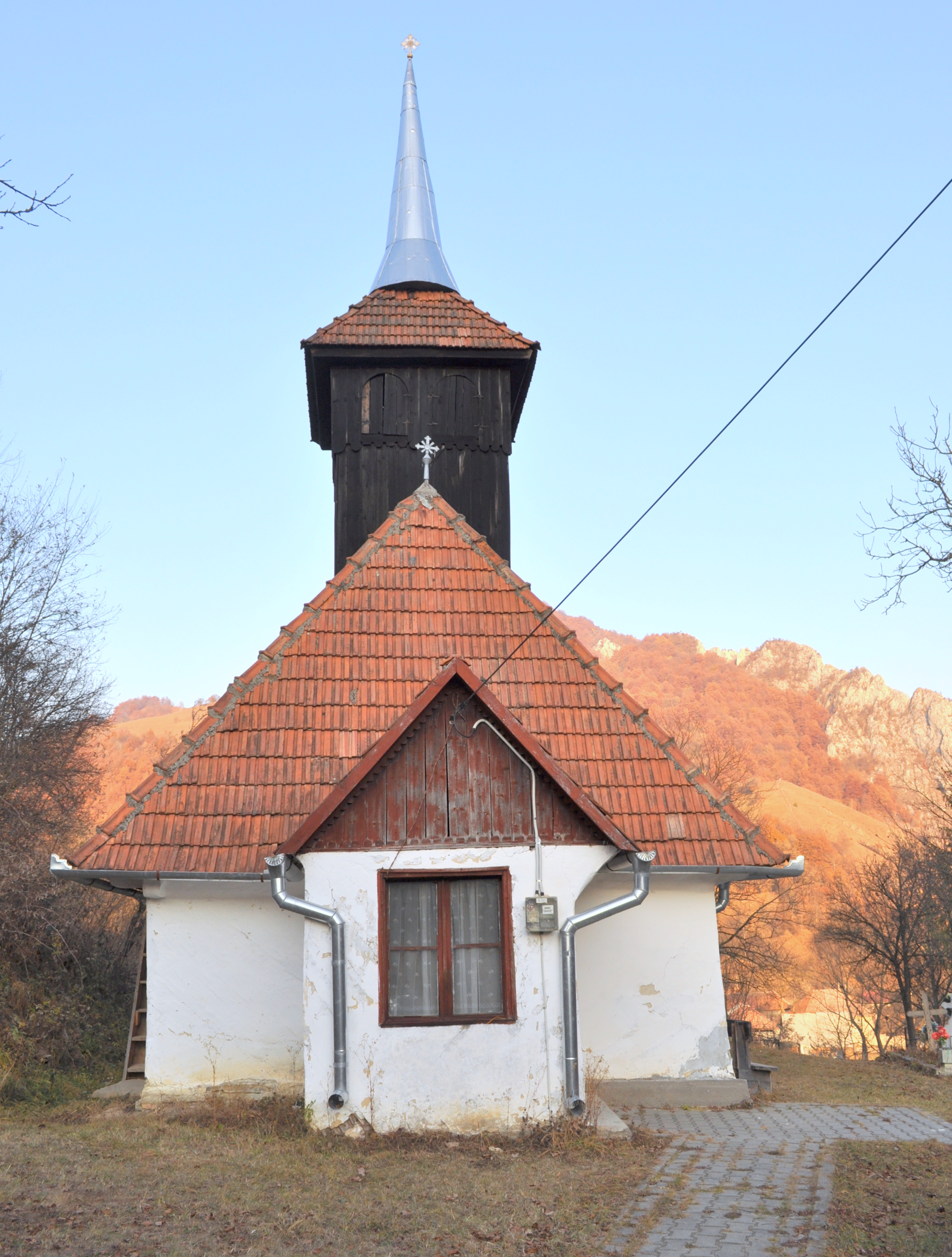 Întregalde, județul Alba